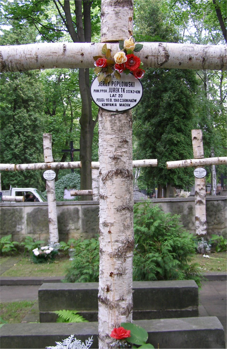 Grób Jerzego Pepłowskiego na Powązkach Wojskowych w Warszawie (fot Zu)